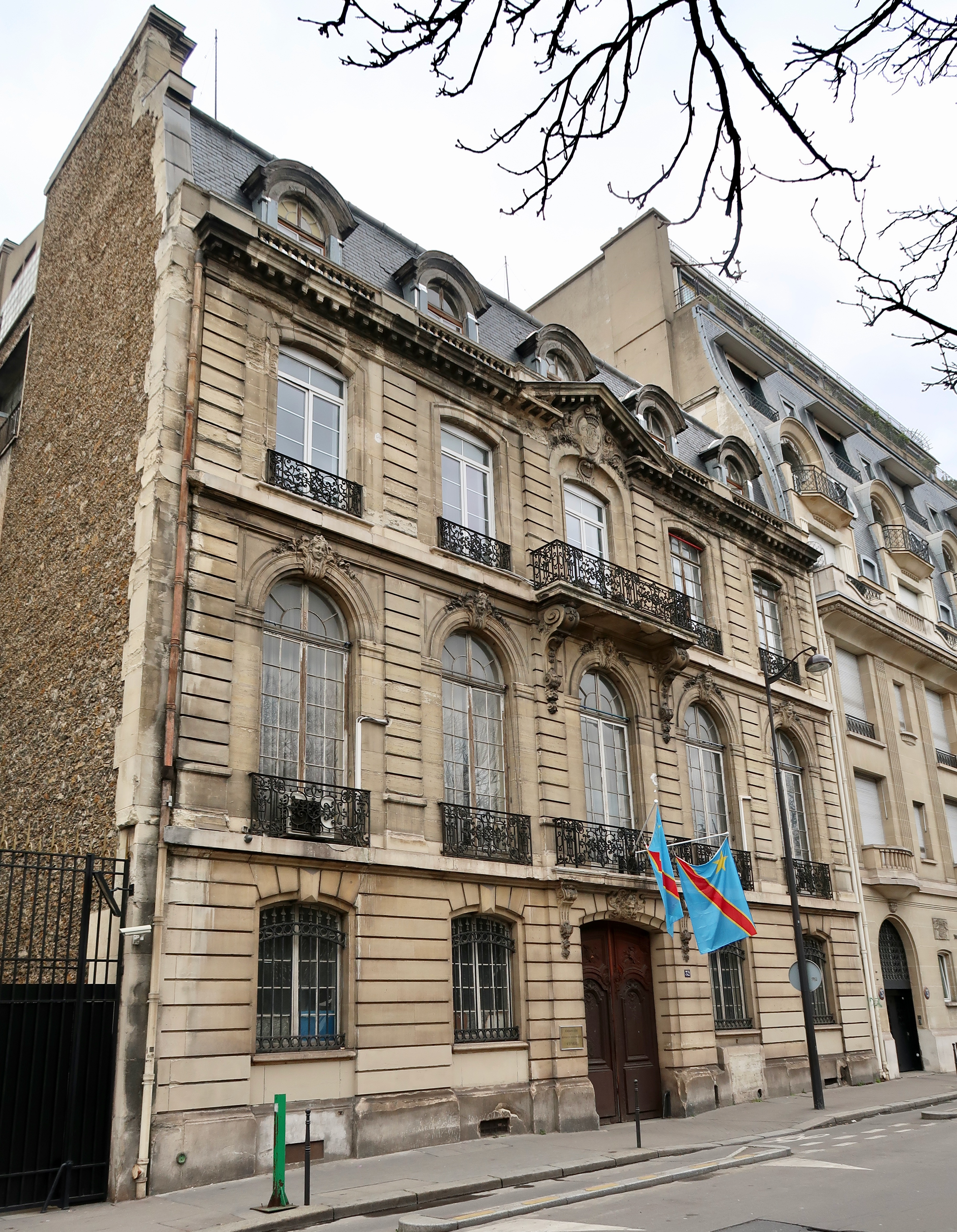 Ambassade de la République démocratique du Congo en France, 32 cours Albert-Ier (Paris, 8e).